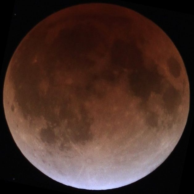 December 2011 lunar eclipse